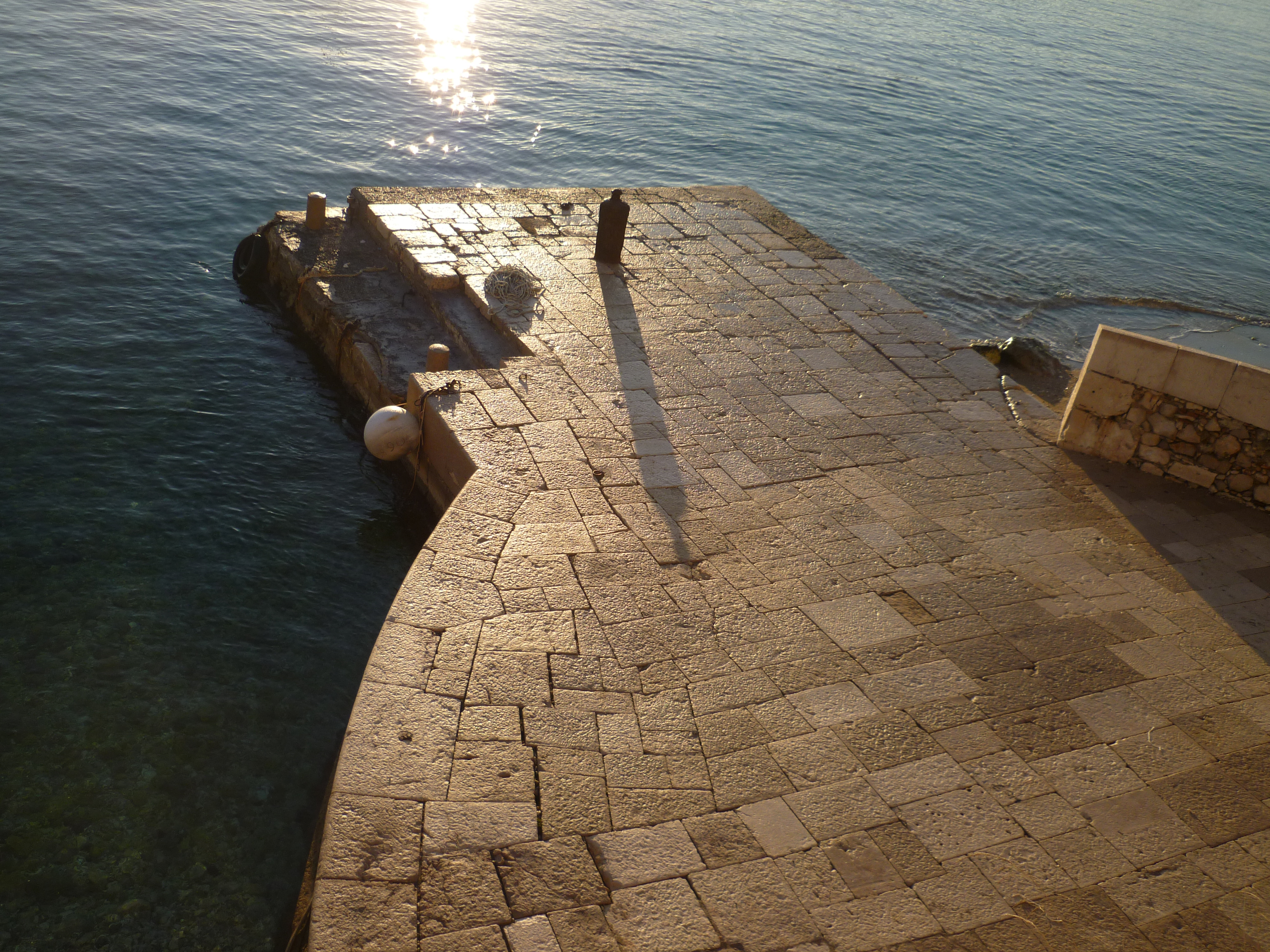 Darse de Villefranche-sur-Mer Môle de l'Observatoire océanologique